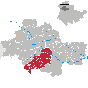 Verwaltungsgemeinschaft Unstrut-Hainich in Thuringia - Unstrut-Hainich-Kreis